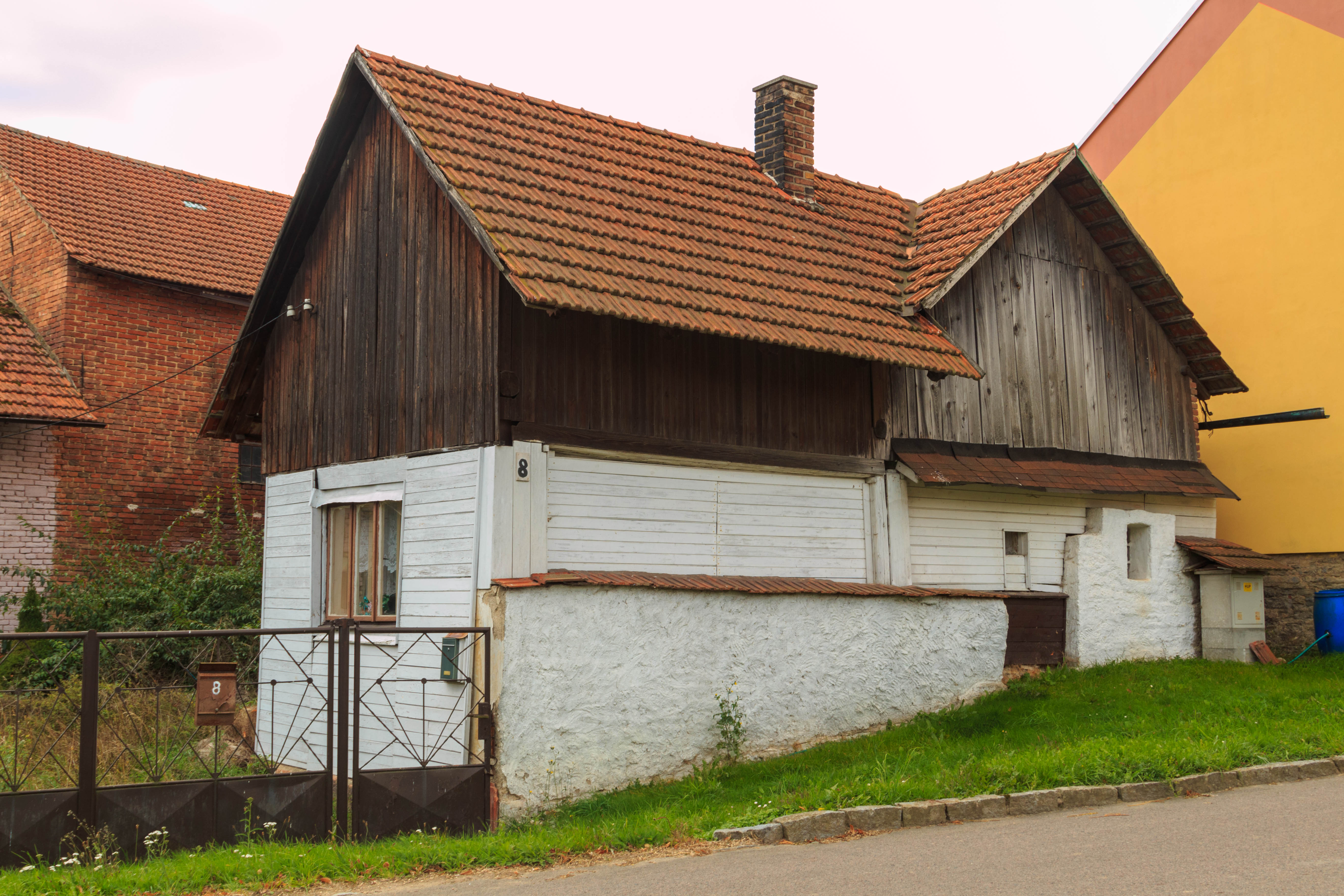 Martinice čp. 8